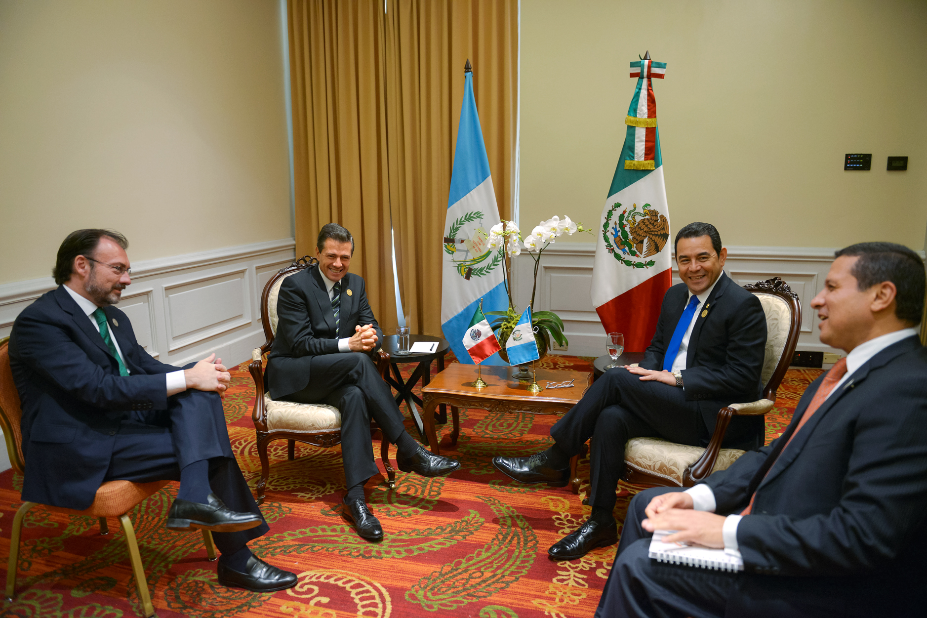 Jimmy Morales-Enrique Peña Nieto